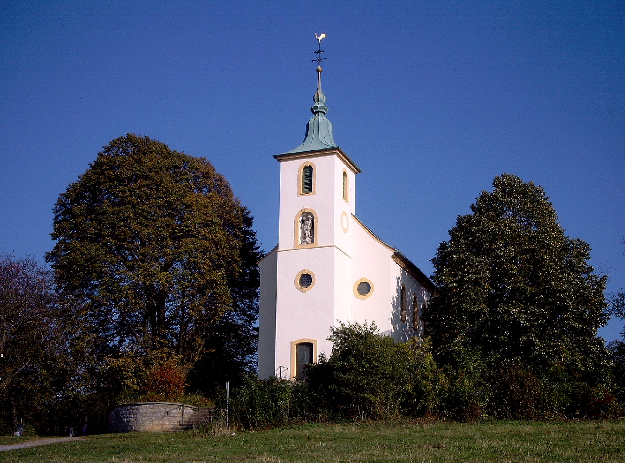 MichaelsKapelle bei Untergrombach auf dem Michaelsberg